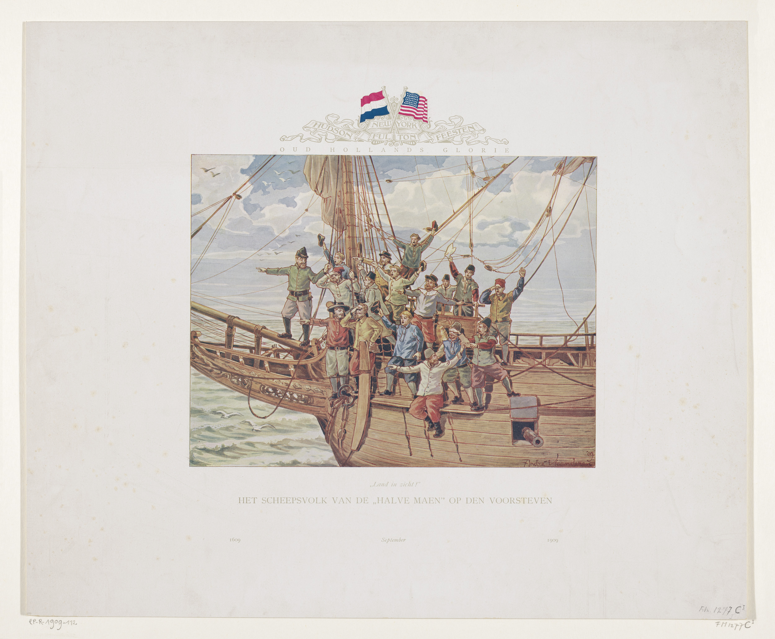 IdentificatieTitel(s): Het schip van Henry Hudson, de Halve Maen, nadert de Noord-Amerikaanse kust, 1609"Land in zicht !" Het scheepsvolk van de "Halve Maen" op den voorsteven (titel op object)Objecttype: reproductie historieprent Objectnummer: RP-R-1909-112Catalogusreferentie: FMH 1277-CIOpmerking: (toegevoegd nummer RPK)Omschrijving: Het schip van Henry Hudson, de Halve Maen in dienst van de VOC, nadert de Noord-Amerikaanse kust, 1609. Juichende matrozen op het voorsteven van een schip. Onderdeel van een groep prenten: Oud Hollands Glorie / New York, Hudson, Fulton Feesten van september 1909.VervaardigingVervaardiger: naar ontwerp van: André Vlaanderen (vermeld op object)Plaats vervaardiging: NederlandenDatering: 1909Fysieke kenmerken: kleurenreproductieMateriaal: papier Techniek: reproductie van een gekleurde tekeningAfmetingen: blad: h 439 mm × b 530 mmToelichtingNiet in Frederik Muller; door het RPK toegevoegd nummer.OnderwerpWat: exploration, expedition, voyage of discoveryReis van Henry Hudson naar Noord-Amerika (1609)Wanneer: 1609 - 1609Wie: Henry HudsonVerwerving en rechtenVerwerving: onbekend 1909Copyright: Publiek domein